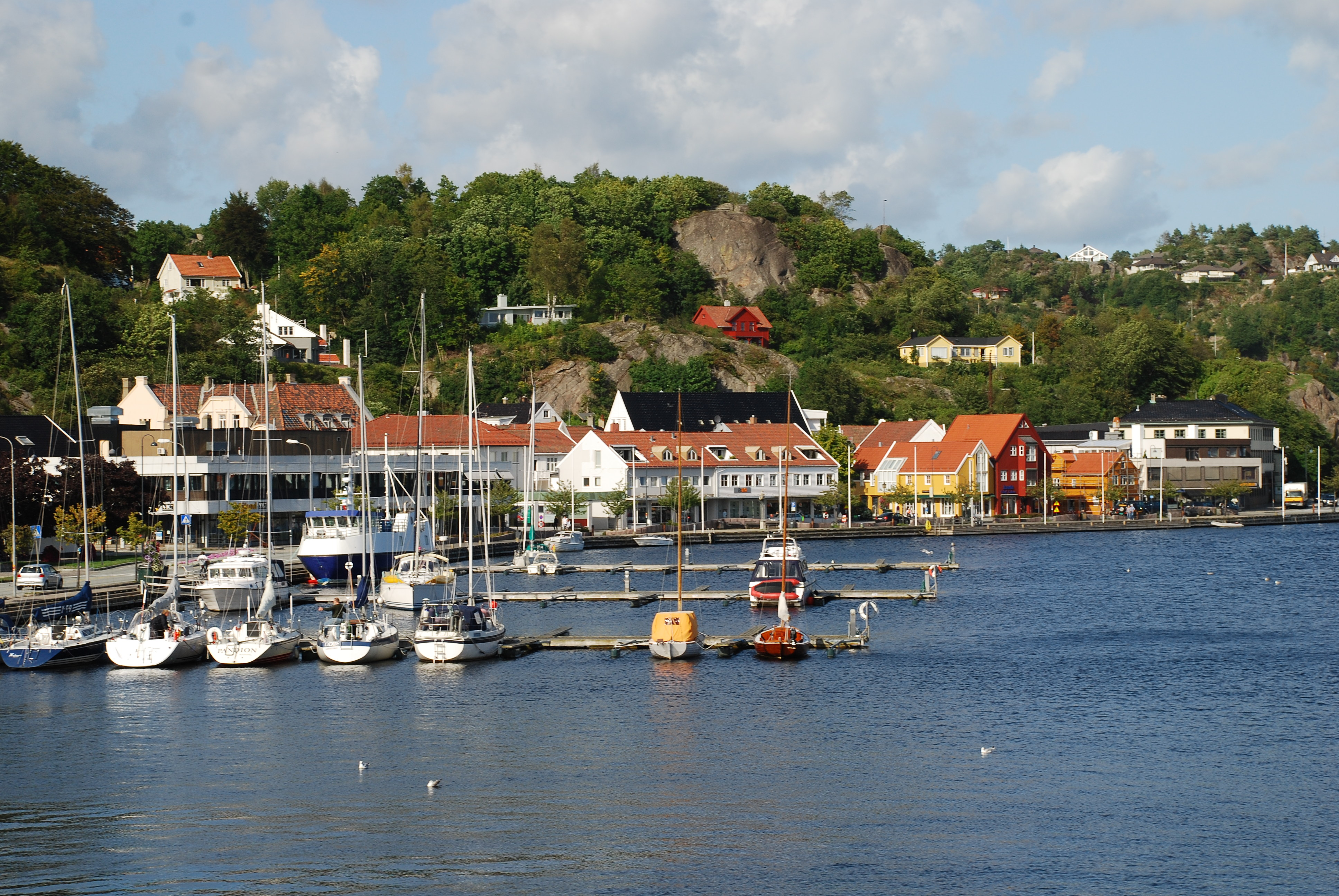 Mandal sentrum og mandalselva. Her ser man bryggegata og gjestehavna